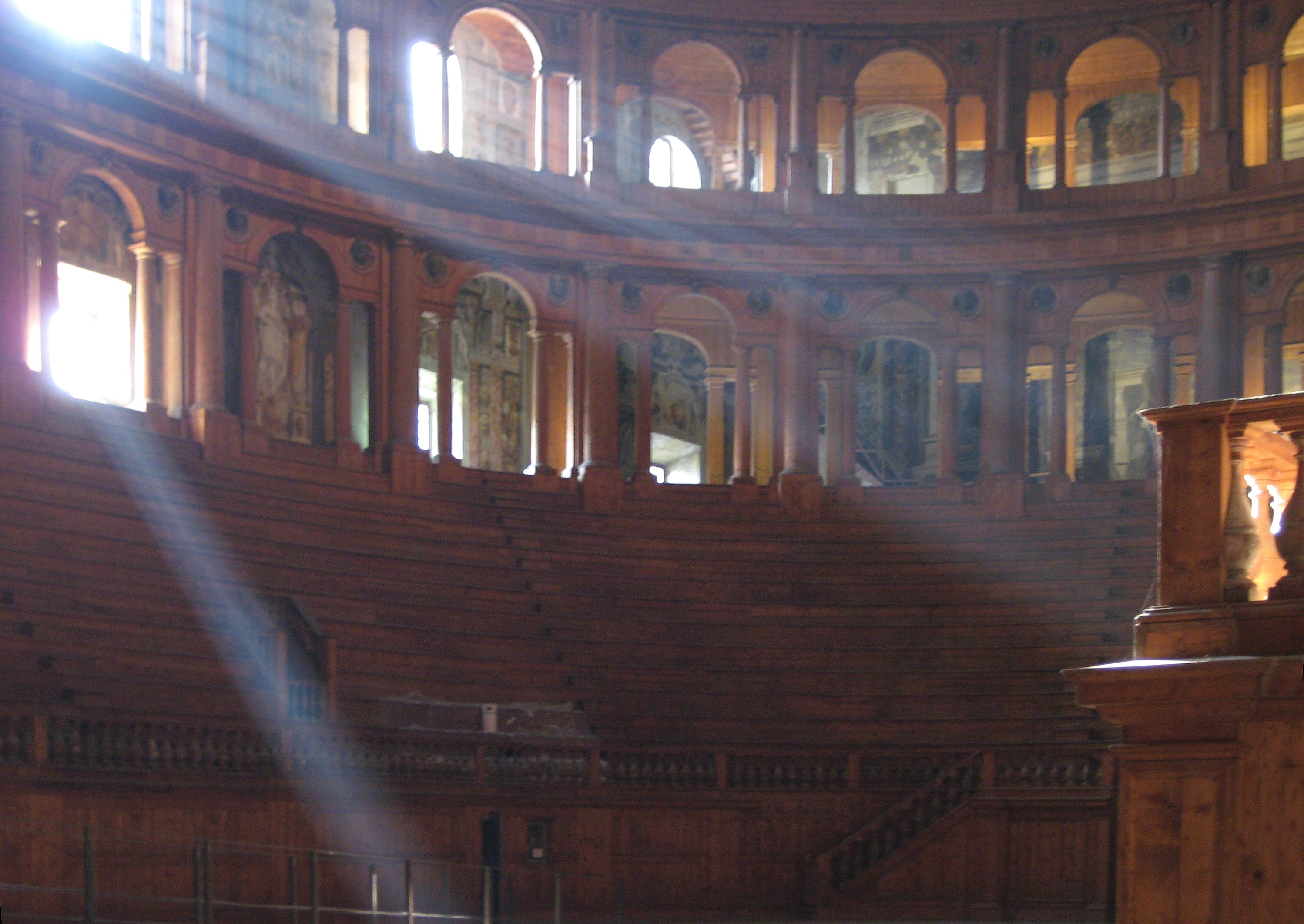 Parma, Teatro Farnese